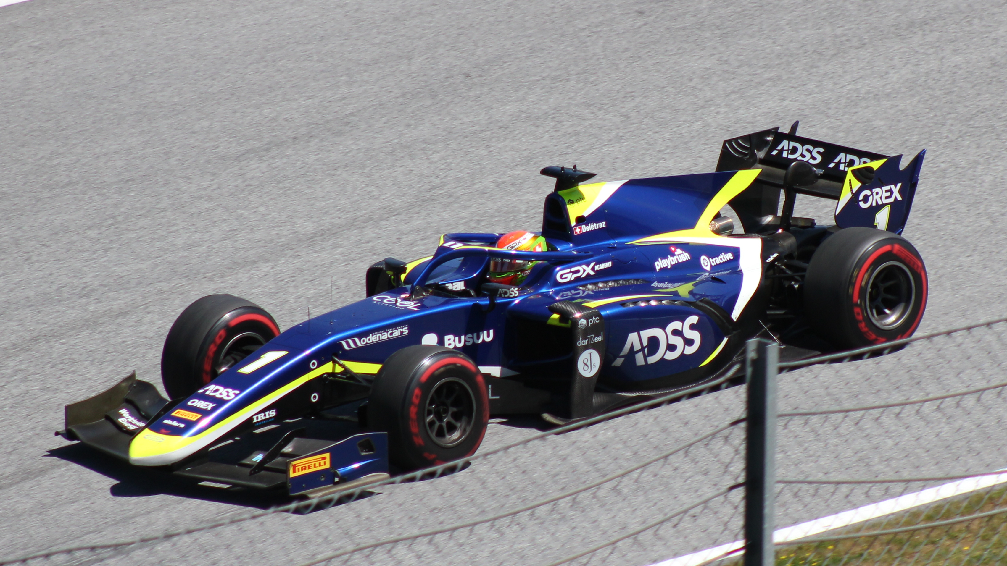 Deletraz beim Rennwochenende in Österreich 2019